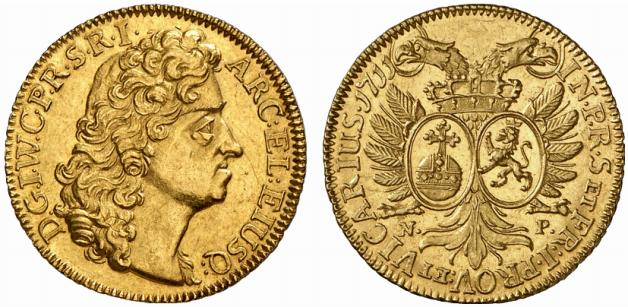 Dukat 1711, Münzstätte Düsseldorf; Johann Wilhelm von der Pfalz